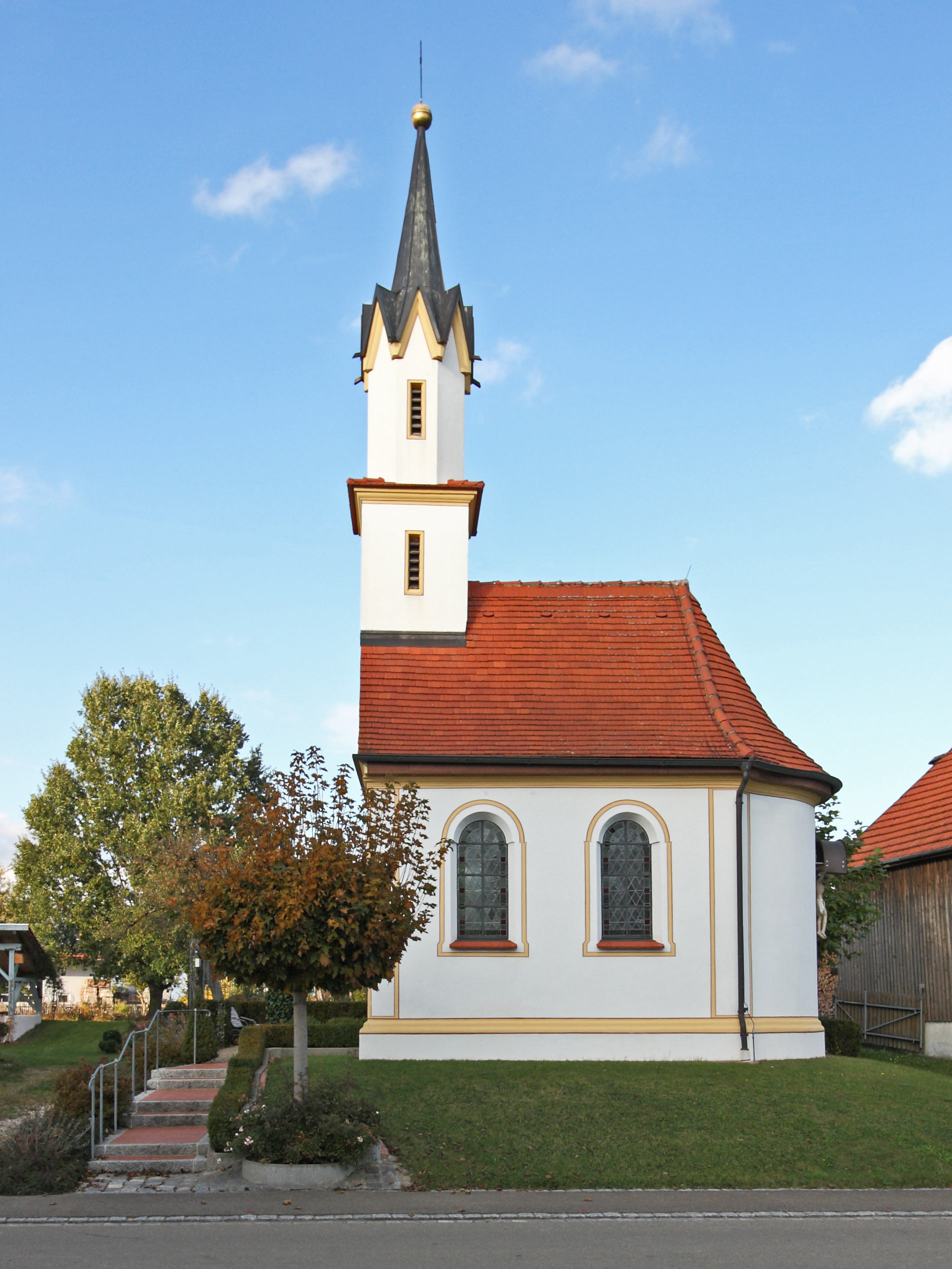 Kapelle Sankt Franziskus in Oberried, Gemeinde Breitenthal; Südansicht